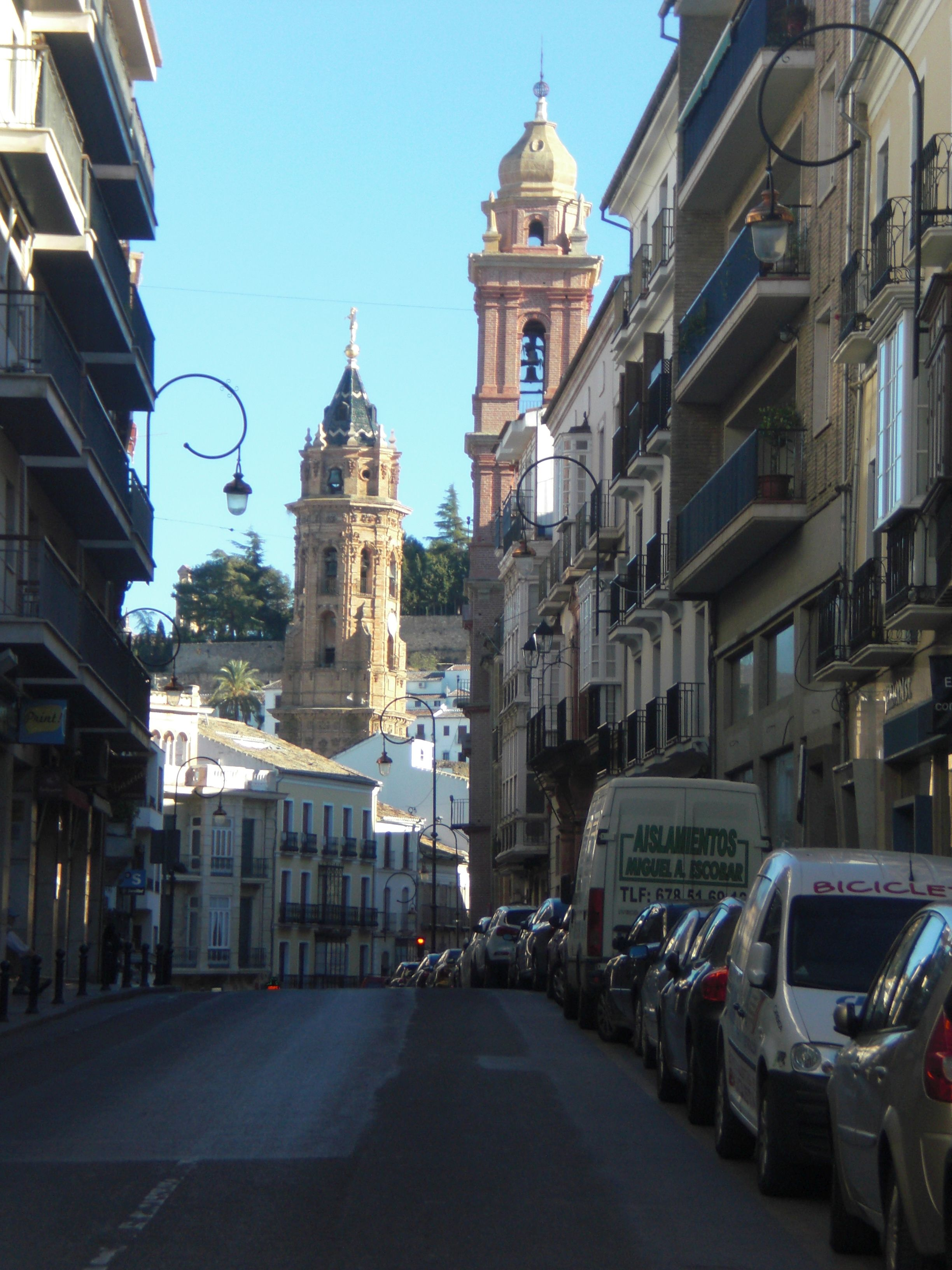 Antekero, vendeja strato.